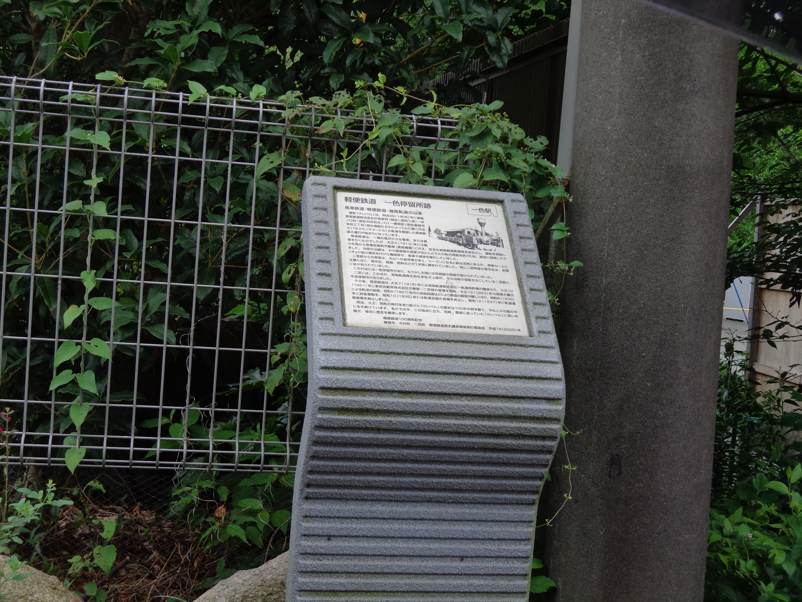 湘南軌道一色駅跡